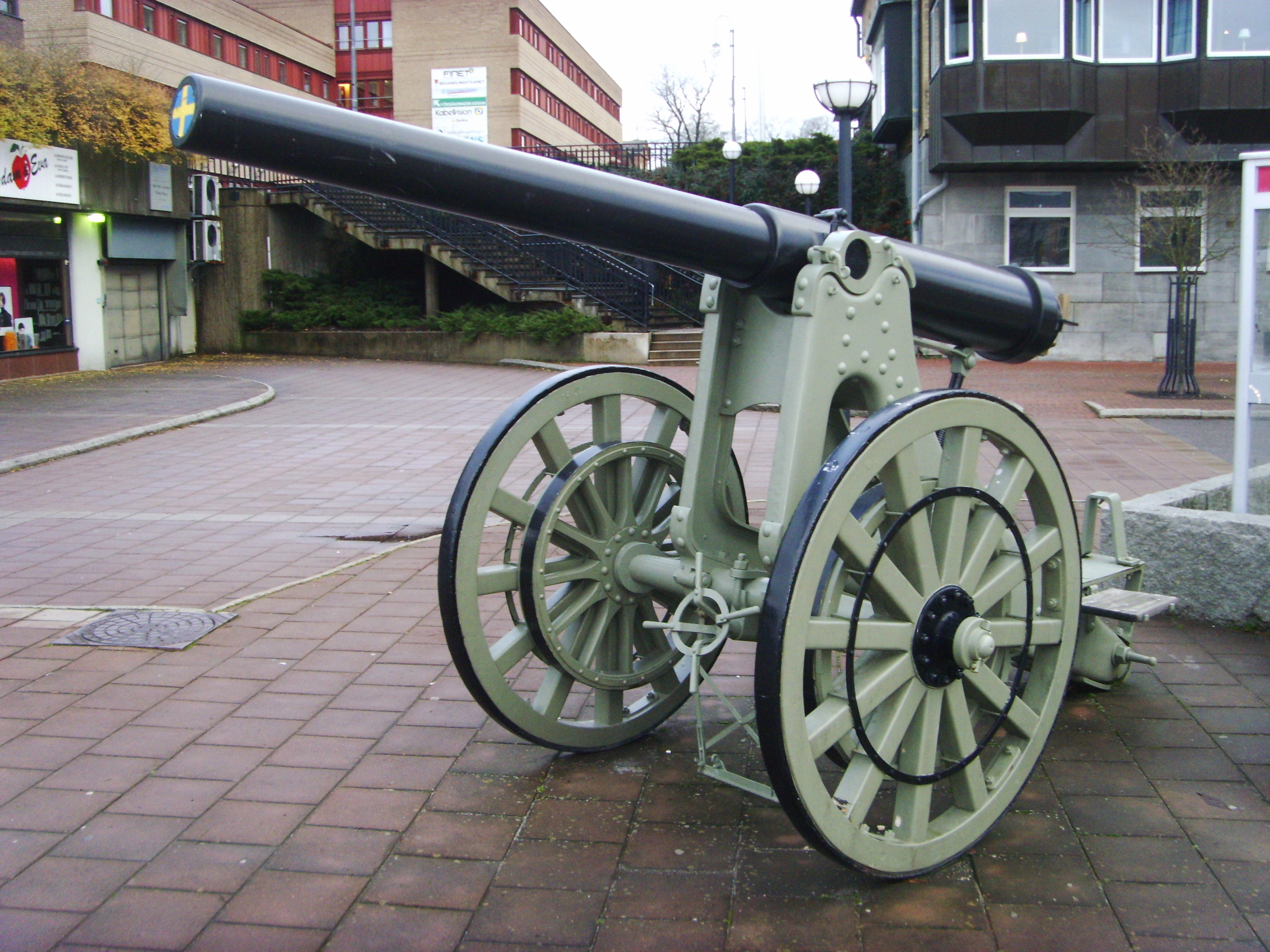 Befästnings- och positionsartilleripjäs på Bergslagstorget i centrala Finspång. Kaliber 12 cm. Räfflad pipa. Stridsladdning 3,5 kg. Granater 16,2 kg. Skottvidd 8600 m. Rekyl 3,5 m. Bemanning 6 man. Förflyttning med 6 hästar. Konstruktion Krupp-Tyskland. Material bestående av stålgöt från Bofors-Gullspång. Tillverkningsort Finspång.